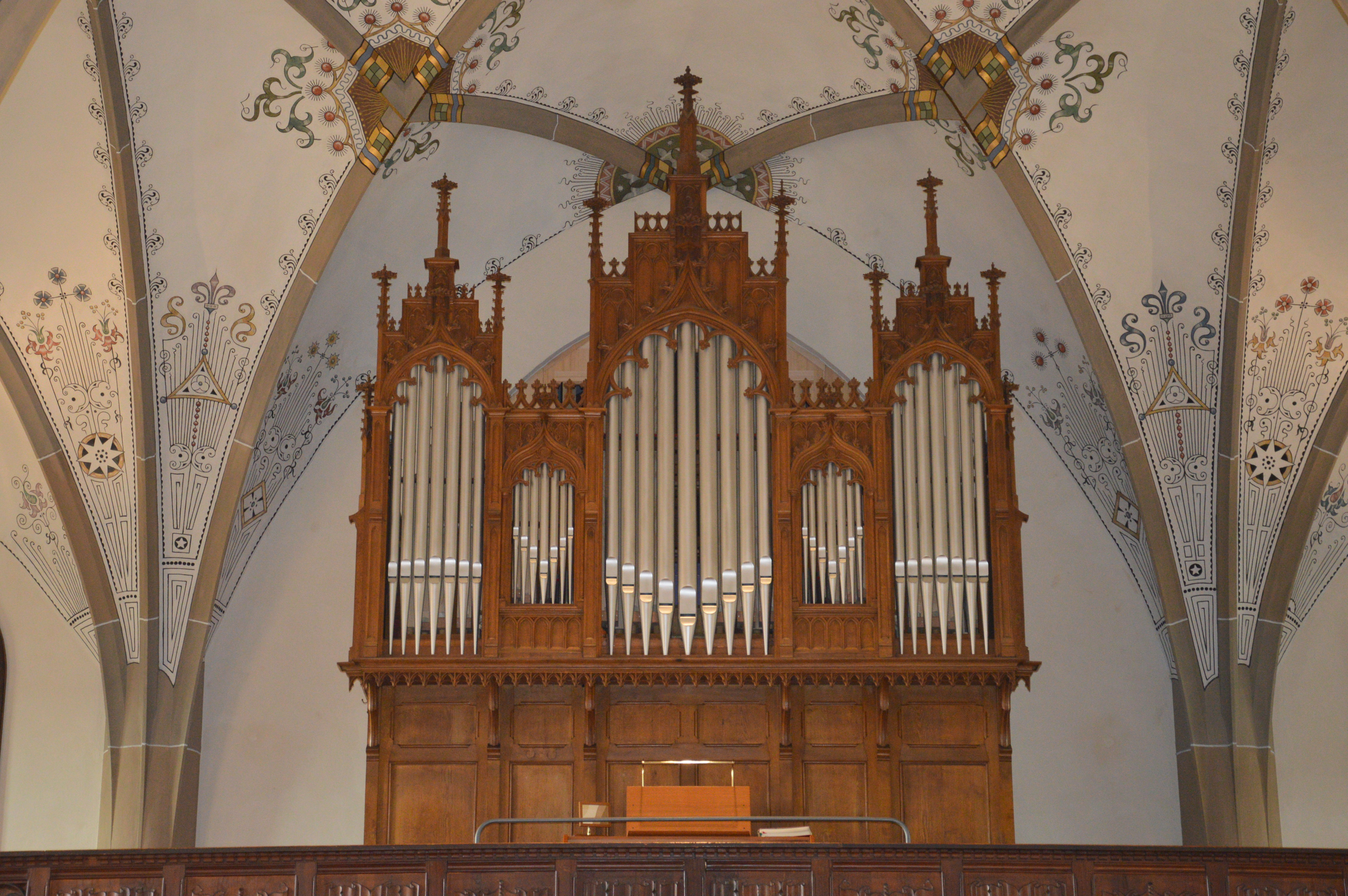 Körfer-Orgel Pfarrkirche St. Matthäus Bad Sobernheim